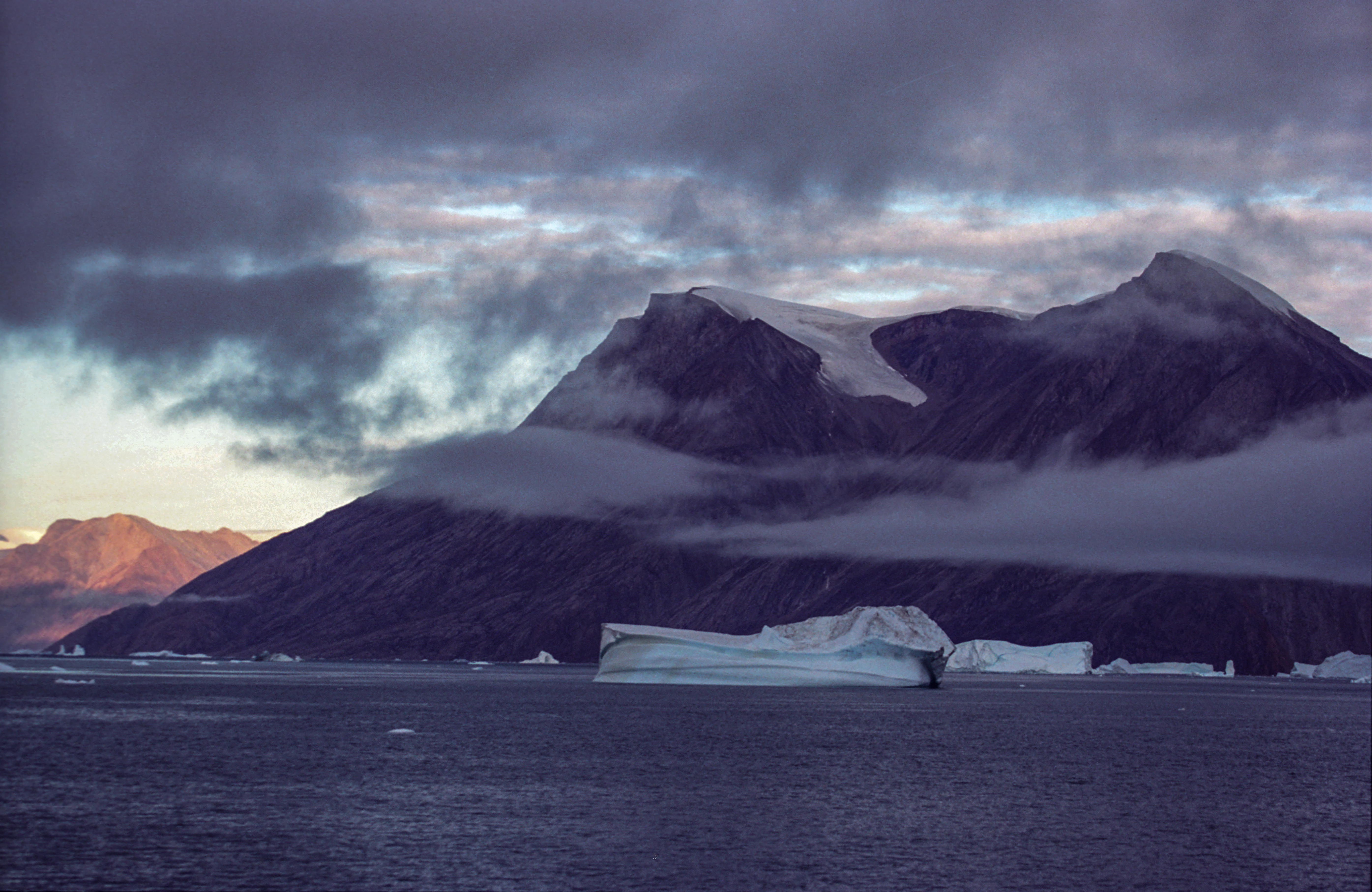 Góry wyspy Ymers